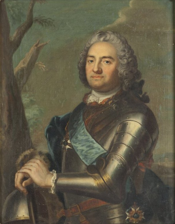 Portrait of Jakob Albrekt von Lantingshausen (1699-1777)